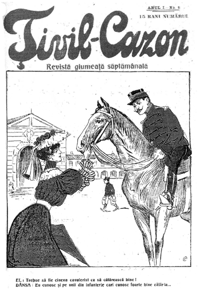 Conversație cu dublu înțeles. Gazeta Țivil-Cazon, nr.9 / 1906.El: Trebuie să fie cineva cavalerist ca să călărească bine!Dânsa: Eu cunosc și pe unii din infanterie care cunosc foarte bine călăria...